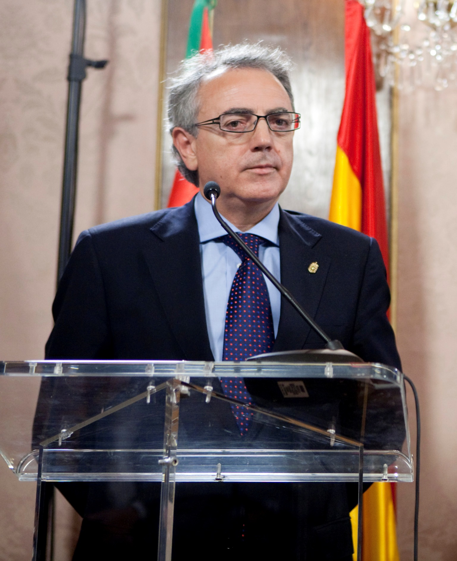 Miguel Sanz, Nafarroako Presidente ohia, Patxi Lopezekin elkartu osteko prentsaurrekoan. Iruñean, 2009ko uztailak 3.